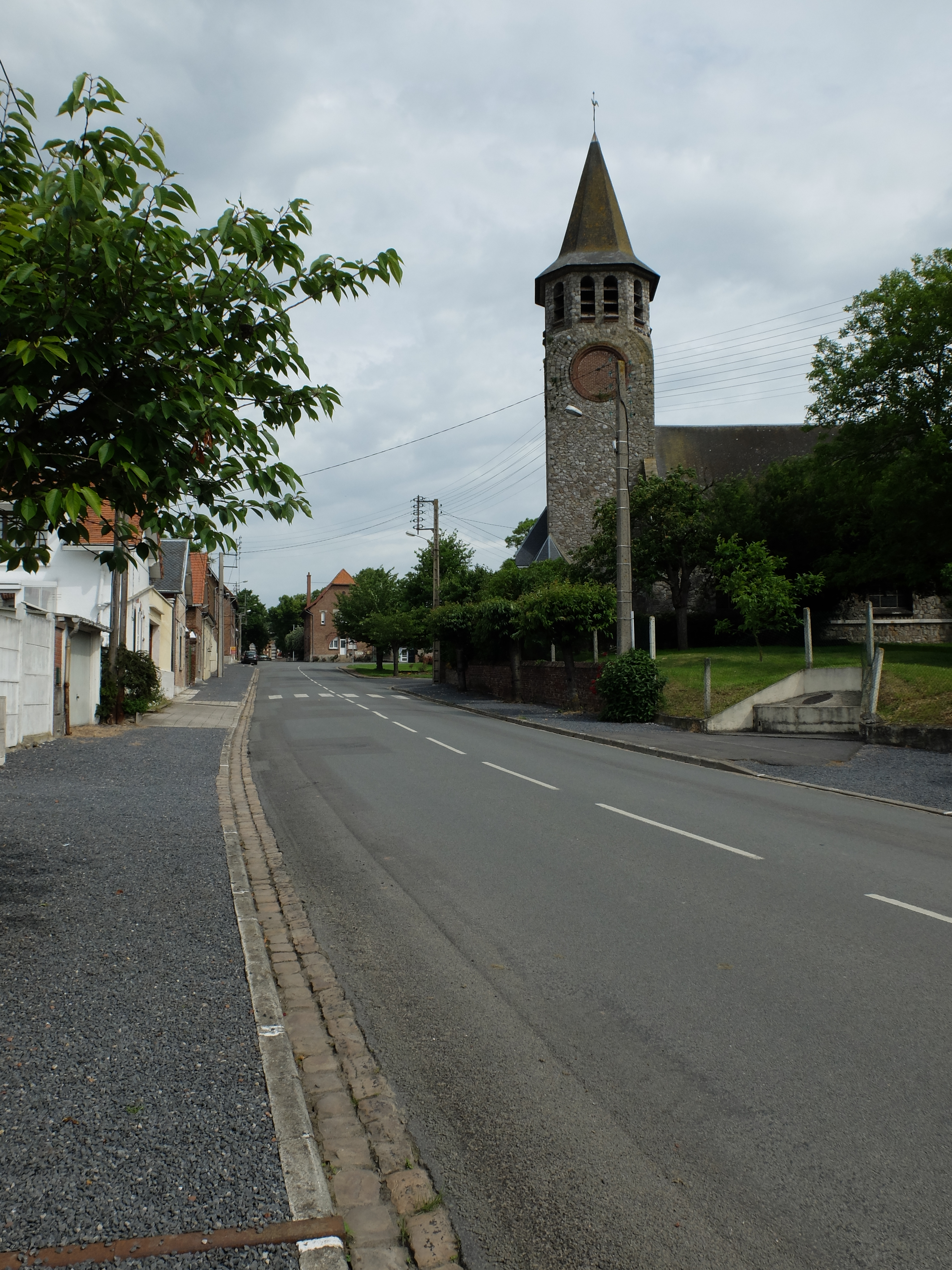 Vue de la rue de l'église de Boiry-Notre-Dame.